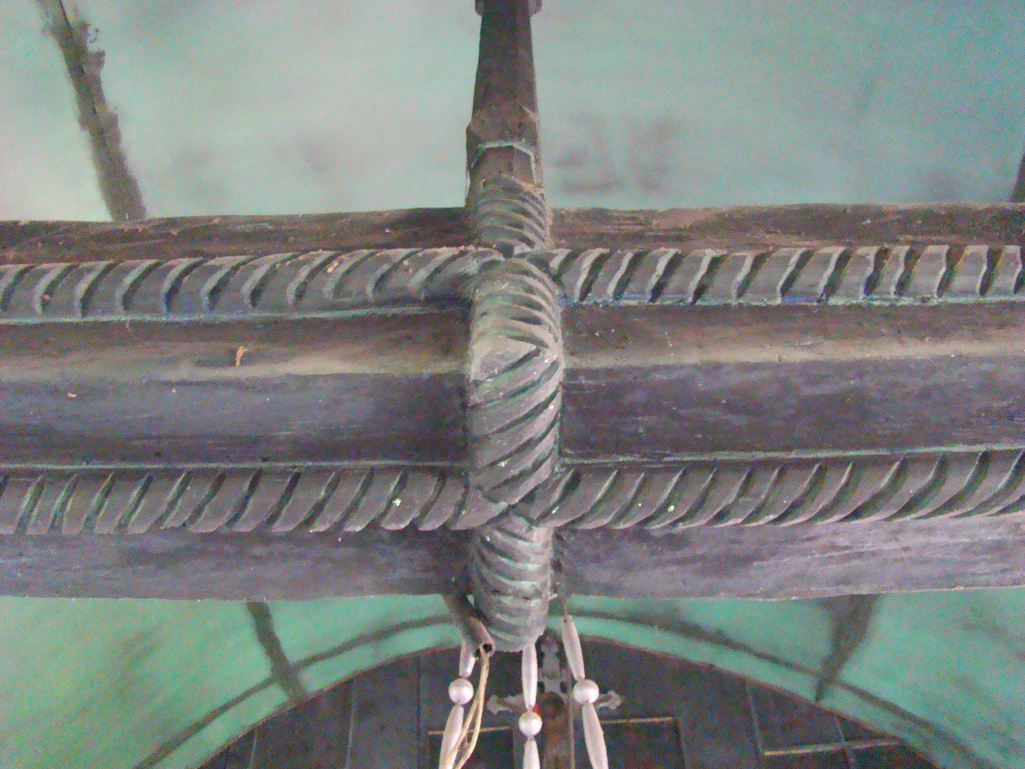 Biserica de lemn „Nașterea Maicii Domnului” din Săucani, județul Bihor